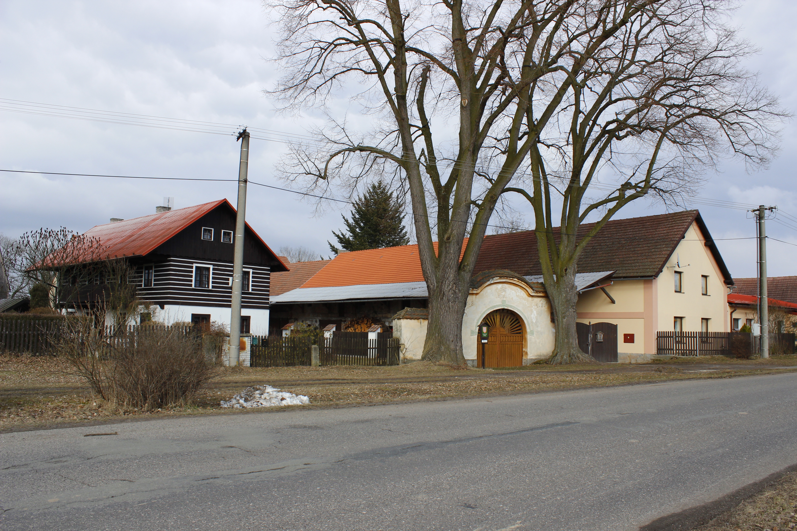 Vjezd do statku číslo popisné 75 v Březince. Brána statku je chráněná jako kulturní památka.